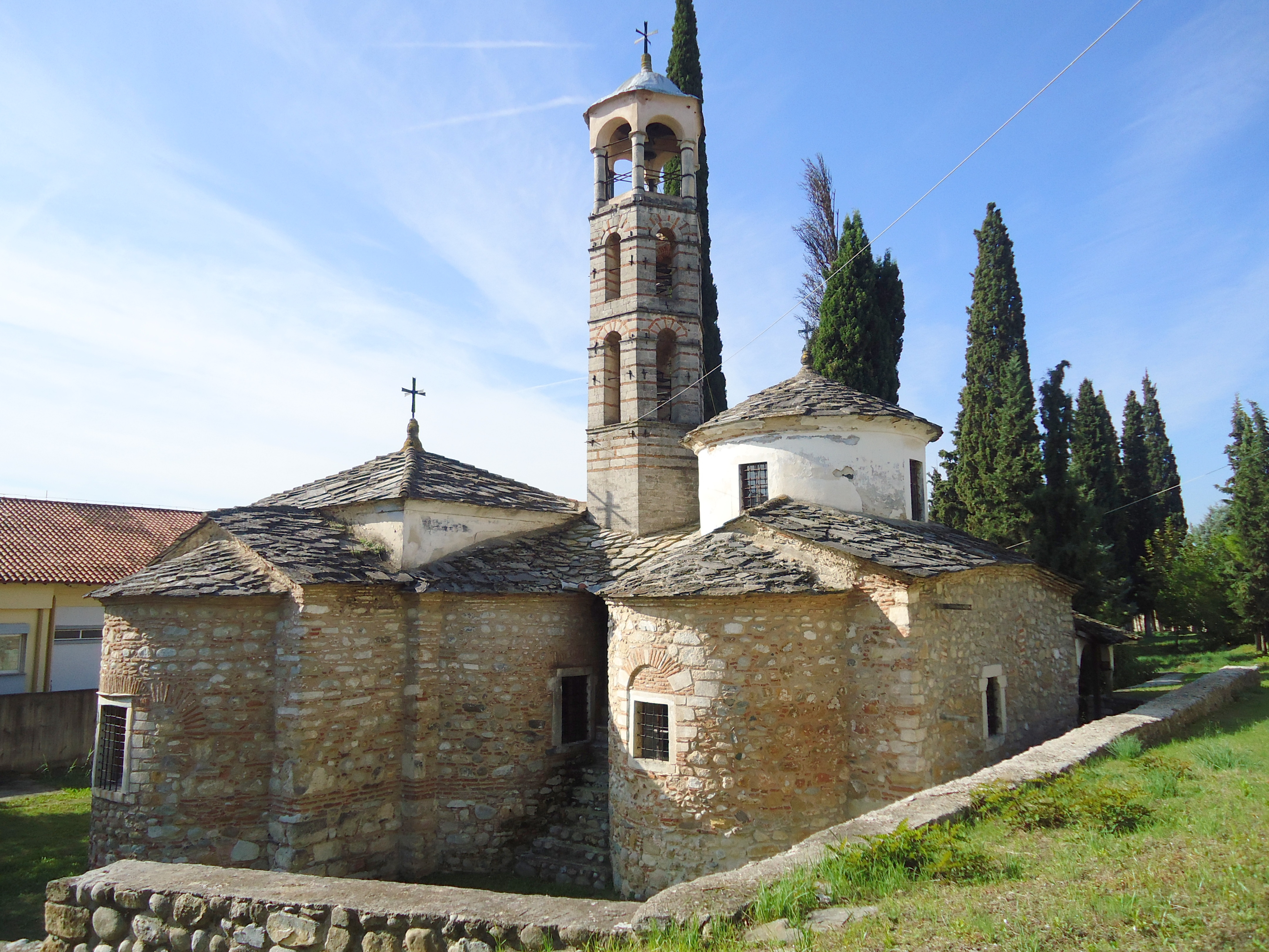 Άγιος Γεώργιος Κρυονερίτης 2.